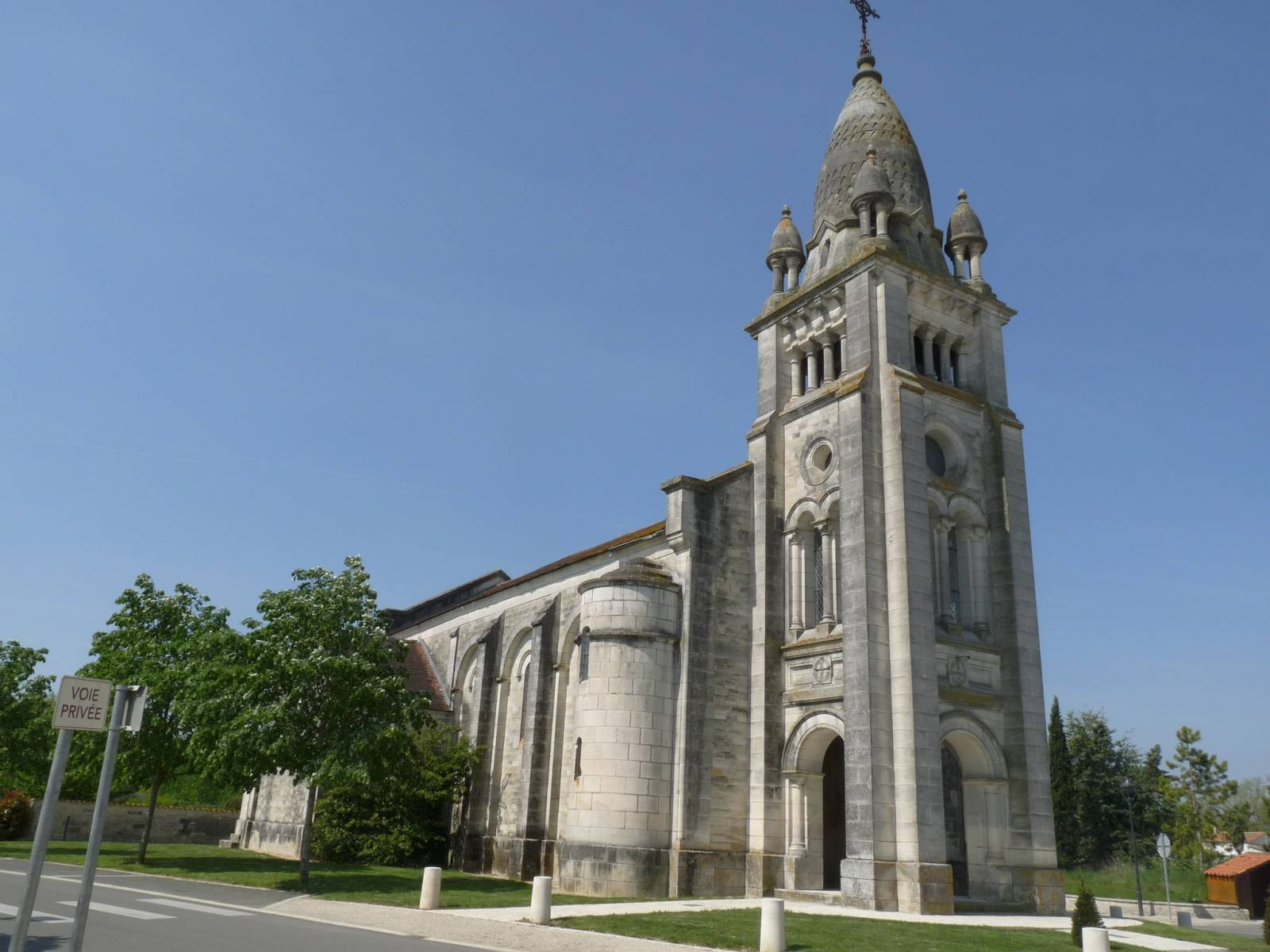 Eglise Ste-Sévère, Charente, France